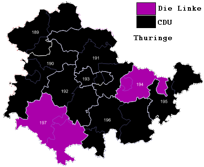 Districts de Thuringe en 2009.